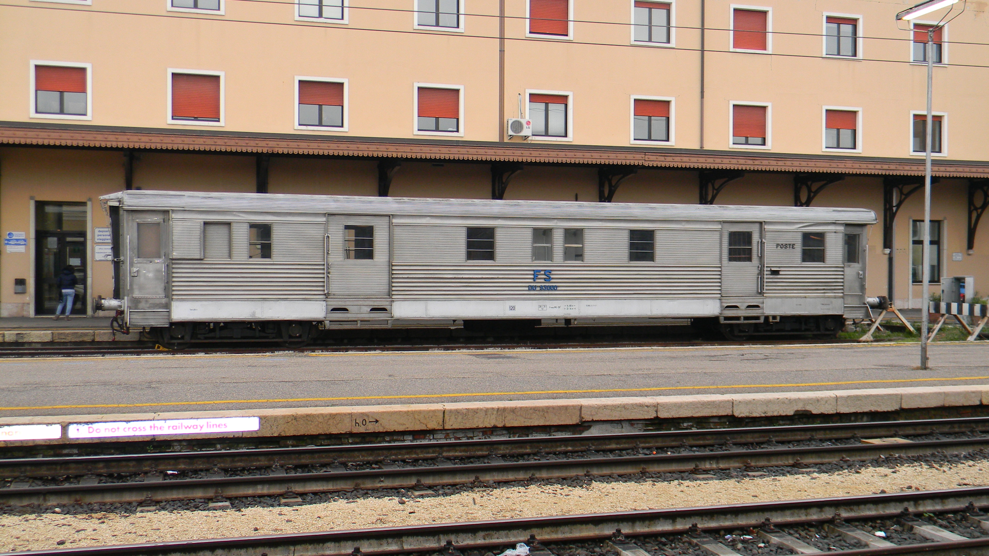 Bagagliaio postale Piaggio DU 93000 in acciaio inox delle Ferrovie dello Stato, in sosta alla stazione di Verona Porta Nuova.